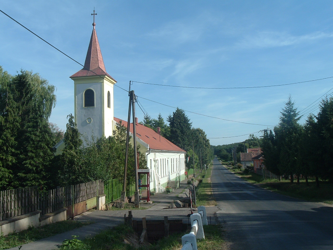 Petőmihályfa, Hungary. Szent Mihály római katolikus iskolakápolna